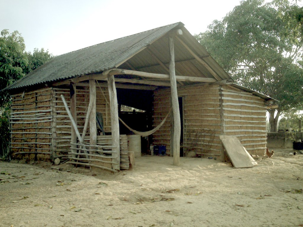 Bahareque llanos house from Venezuela